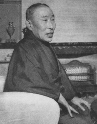 藤井林右衛門（不二家創業者）